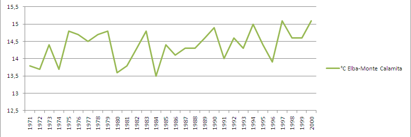 Stazione meteorologica di Elba-Monte Calamita: andamento della temperatura media annua dal 1971 al 2000.